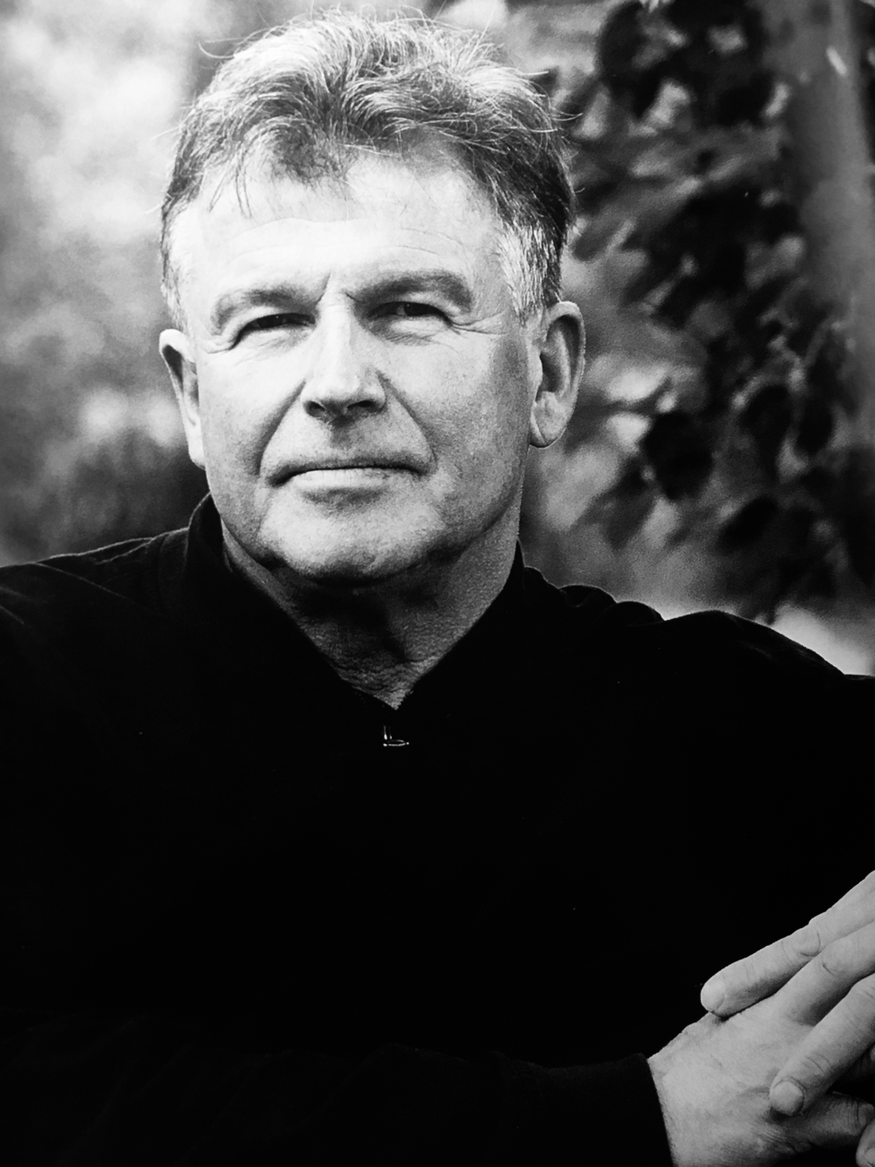 Portree